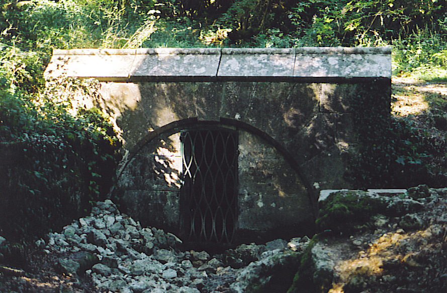 self made